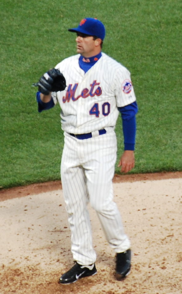 Tim Byrdak